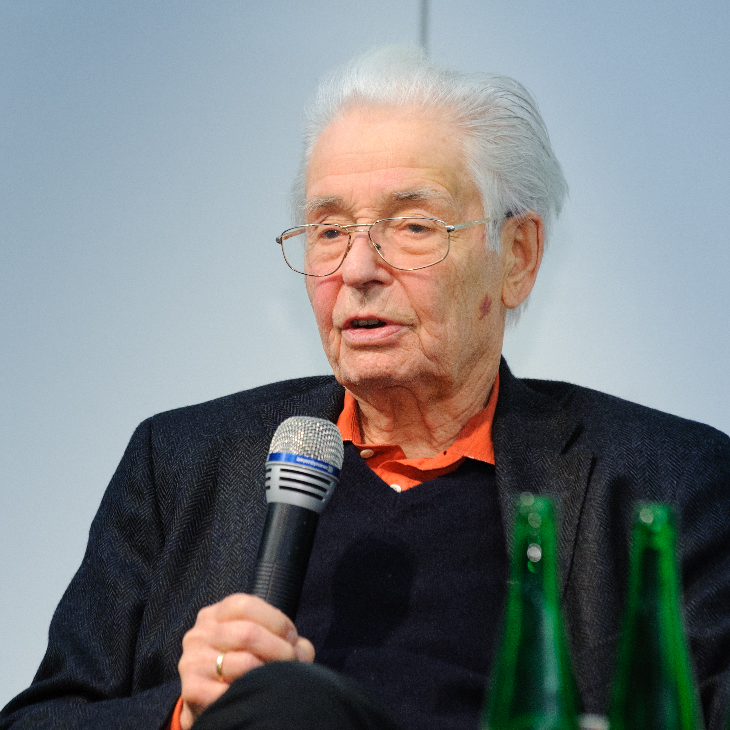 Horst-Eberhard Richter (Psychoanalytiker und Sozialphilosoph) Foto: CC-BY-SA Stephan Röhl